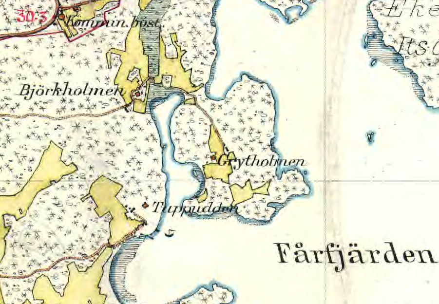 Del av Häradsekonomiska kartan visande Grytholmen på Muskö